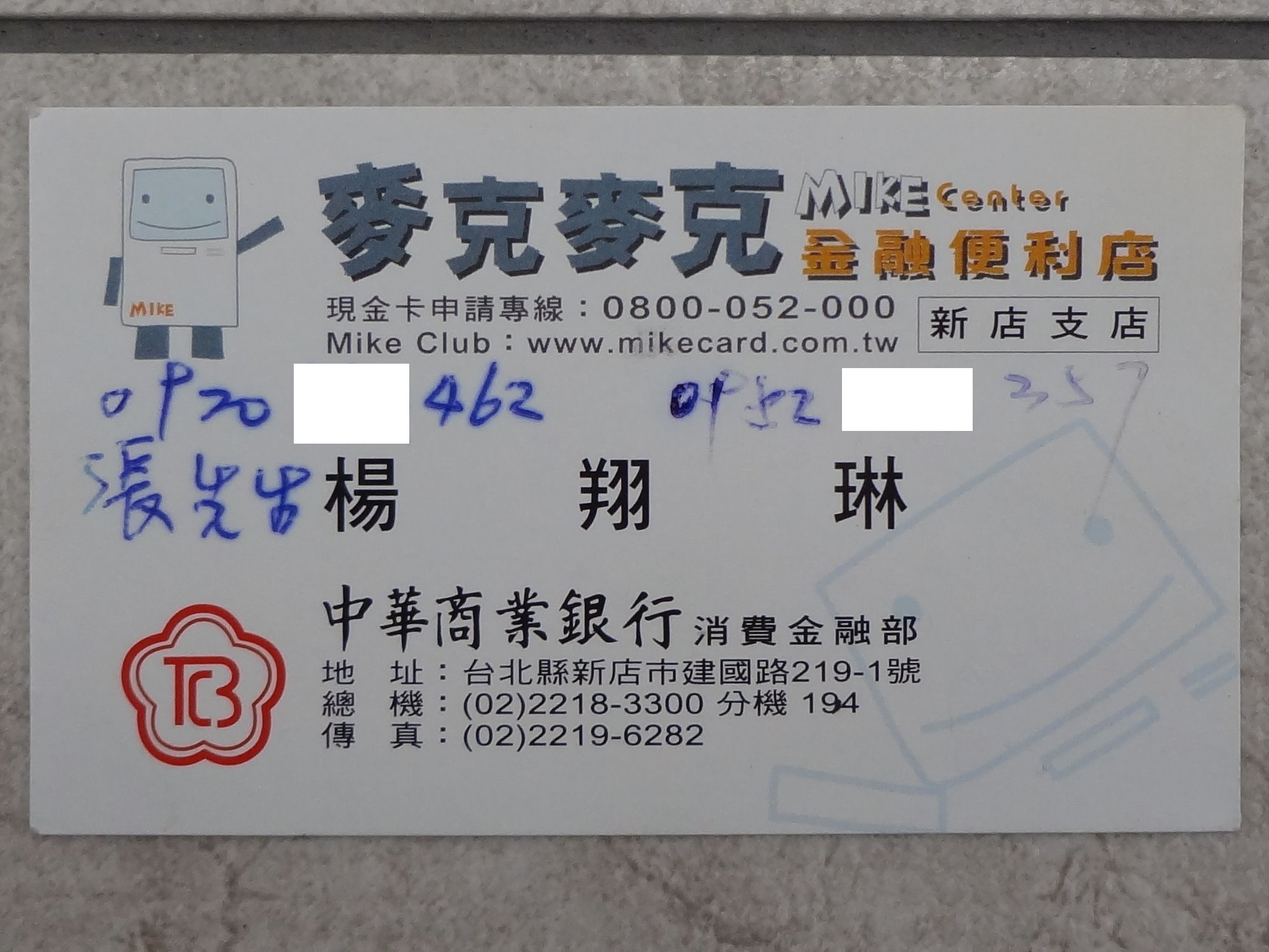 中文（台灣）: 中華商業銀行麥克麥克金融便利店新店支店員工名片。